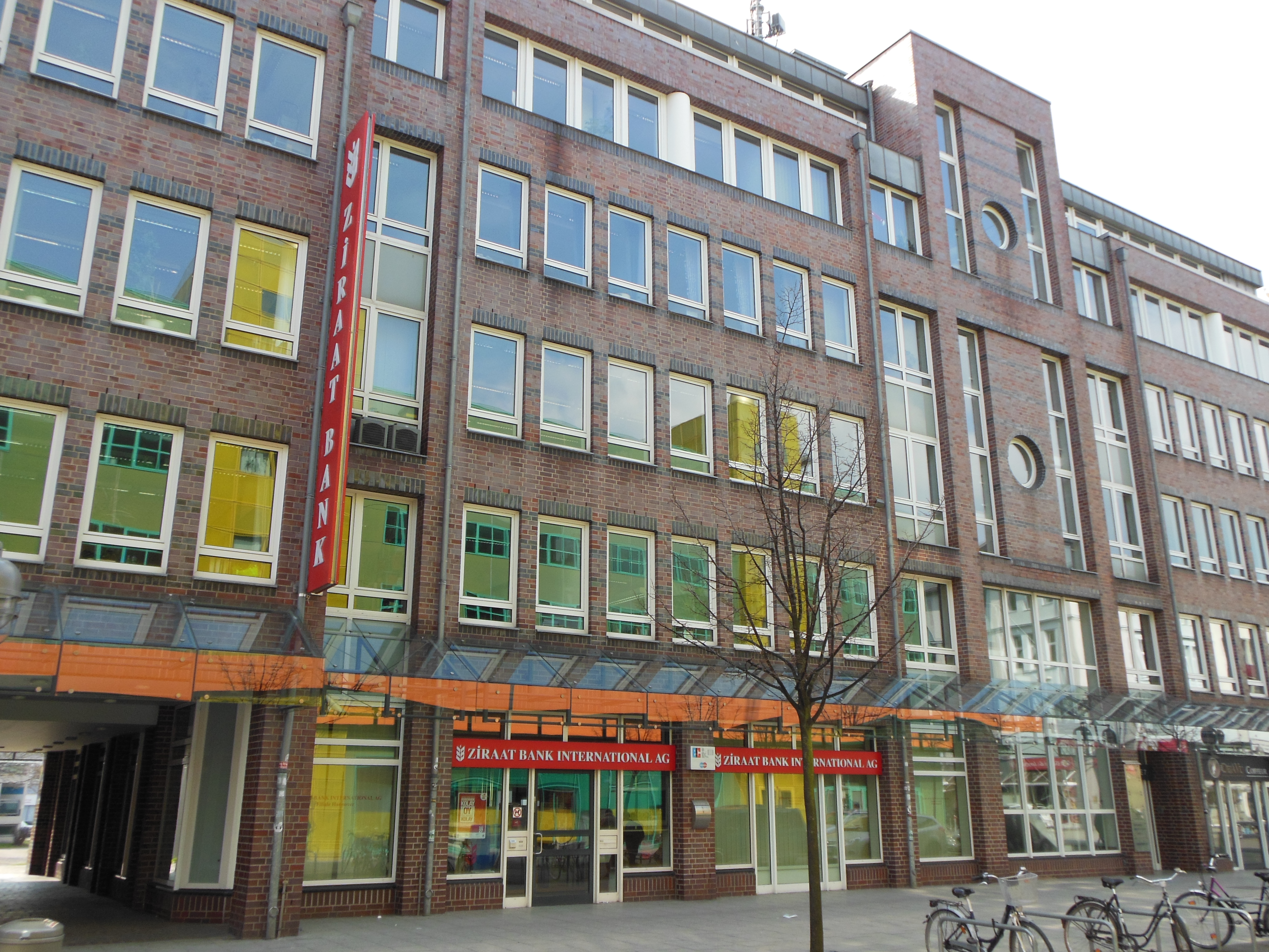 Filiale Hannover der Ziraat Bank International AG, Lange Laube 7, 30159 Hannover, Deutschland